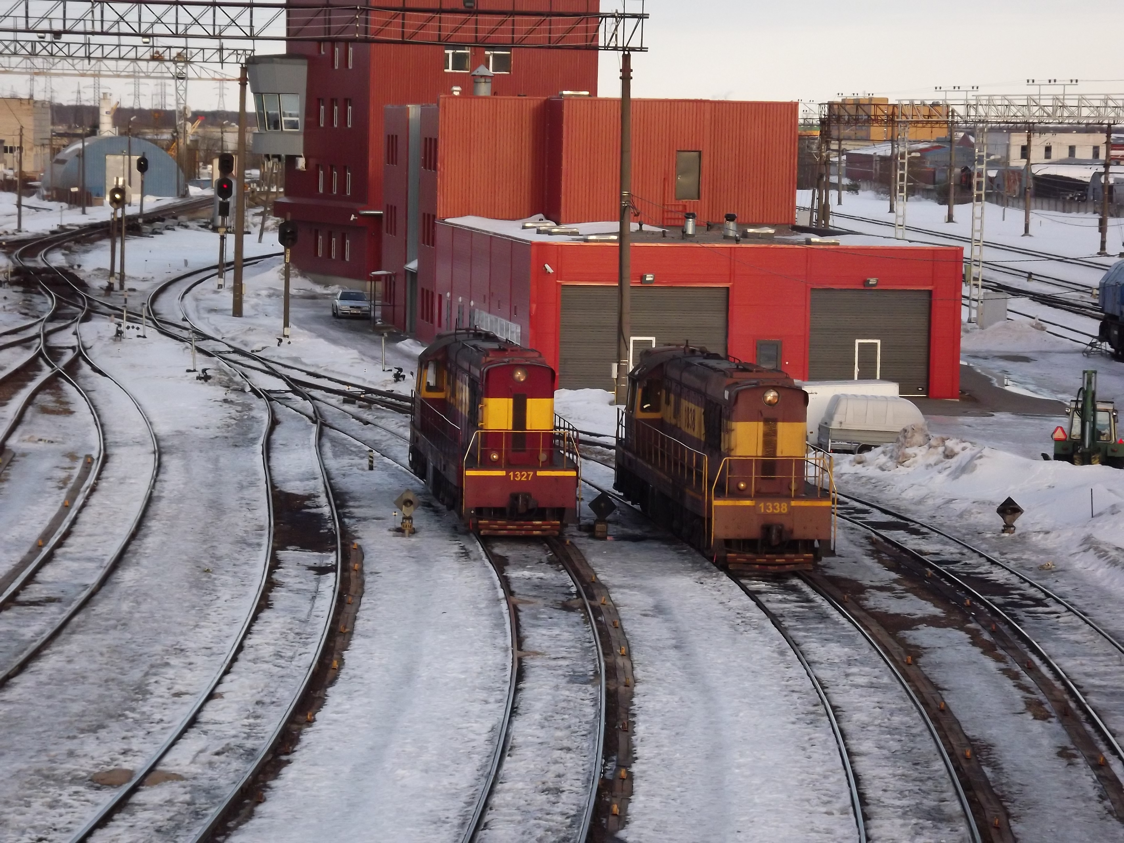 Diiselvedurid ChME3